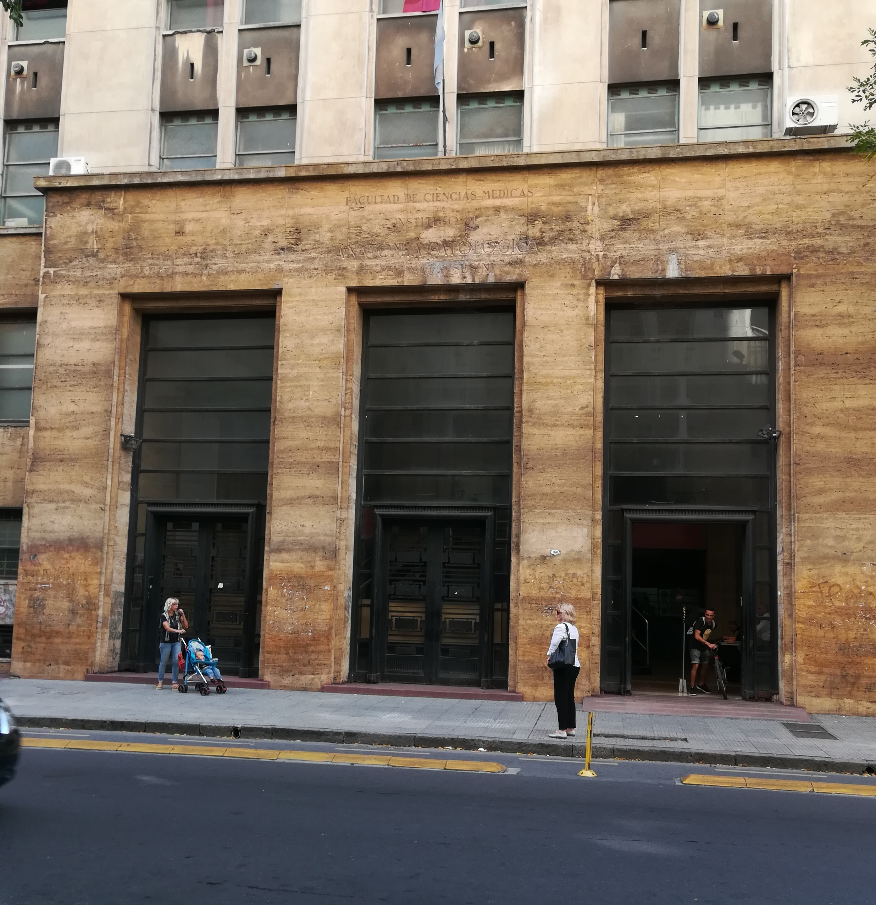 Edificio de Patología, donde también funciona, en su subsuelo, la Sede de legalizaciones de la Universidad de Buenos Aires, ubicado en Uriburu 950.